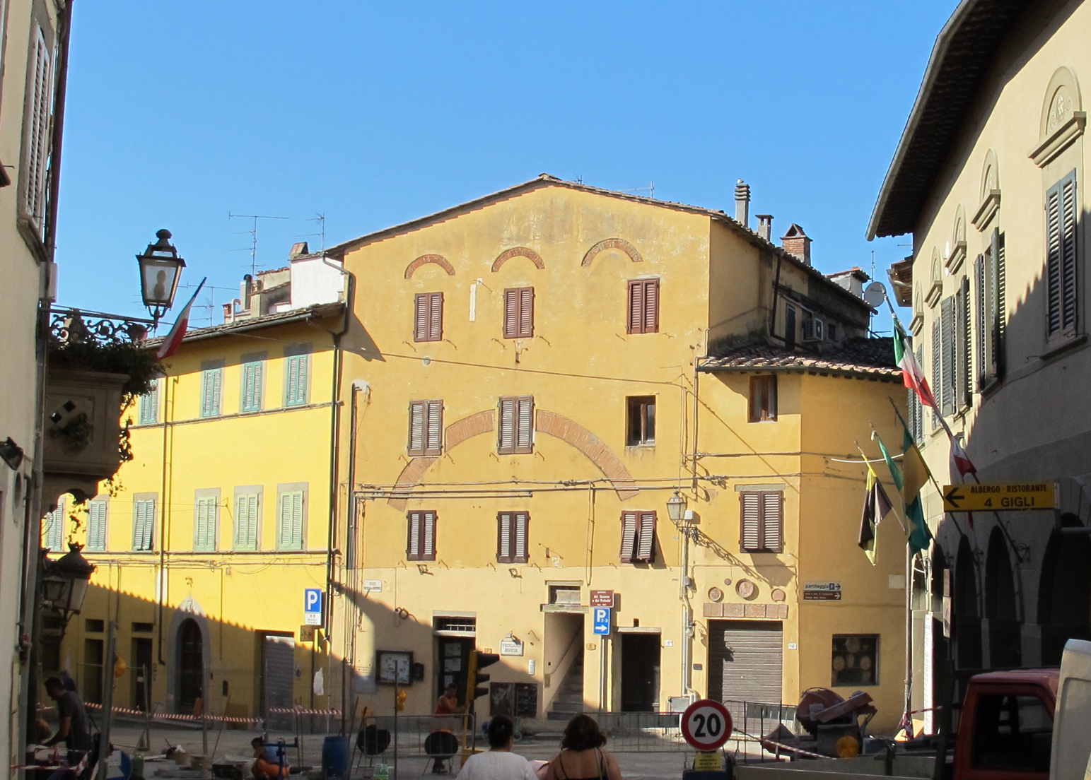 Montopoli v.a., palazzo del vescovo e del potestà, xiii sec